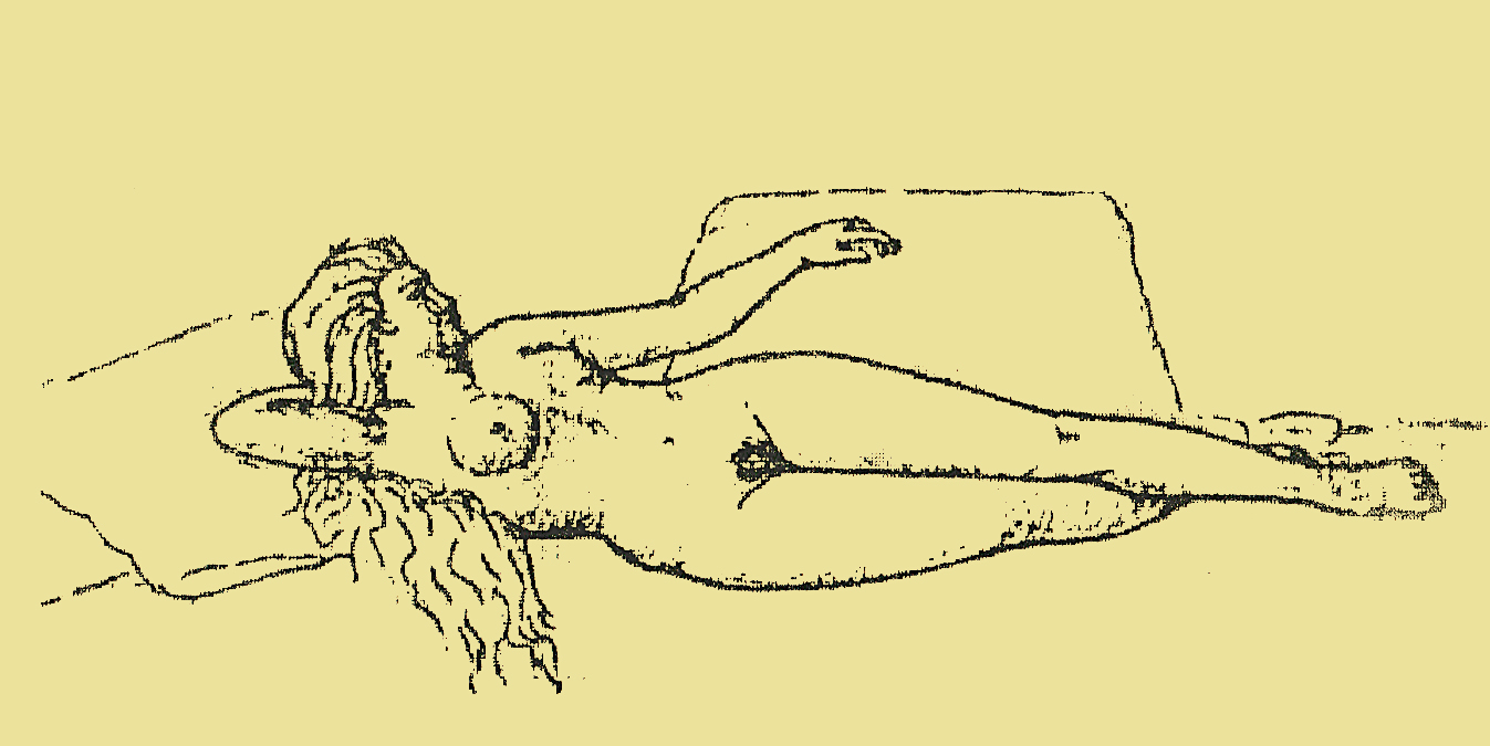 Долгорукая,Екатерина.